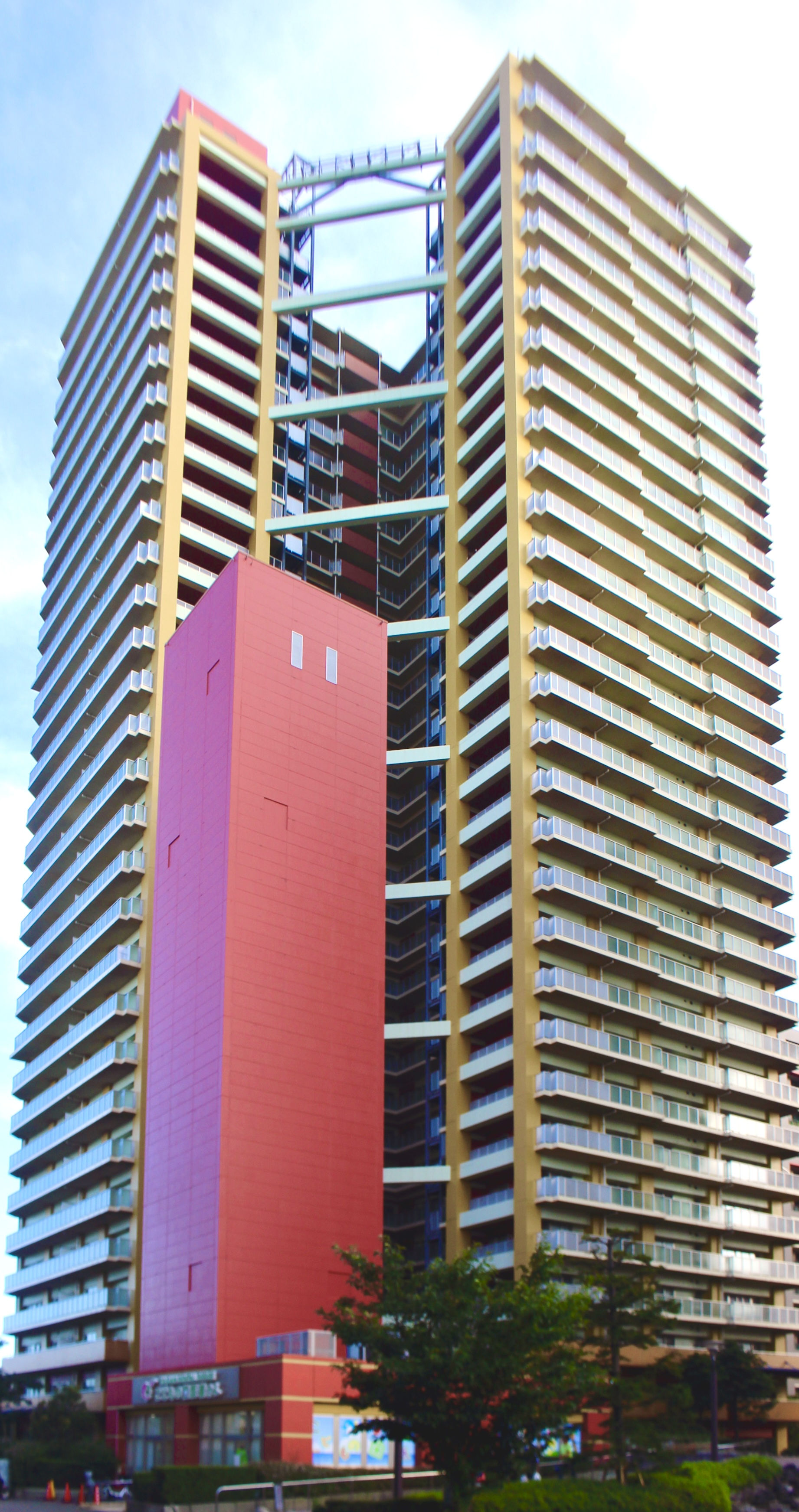 bay mark square city court tower